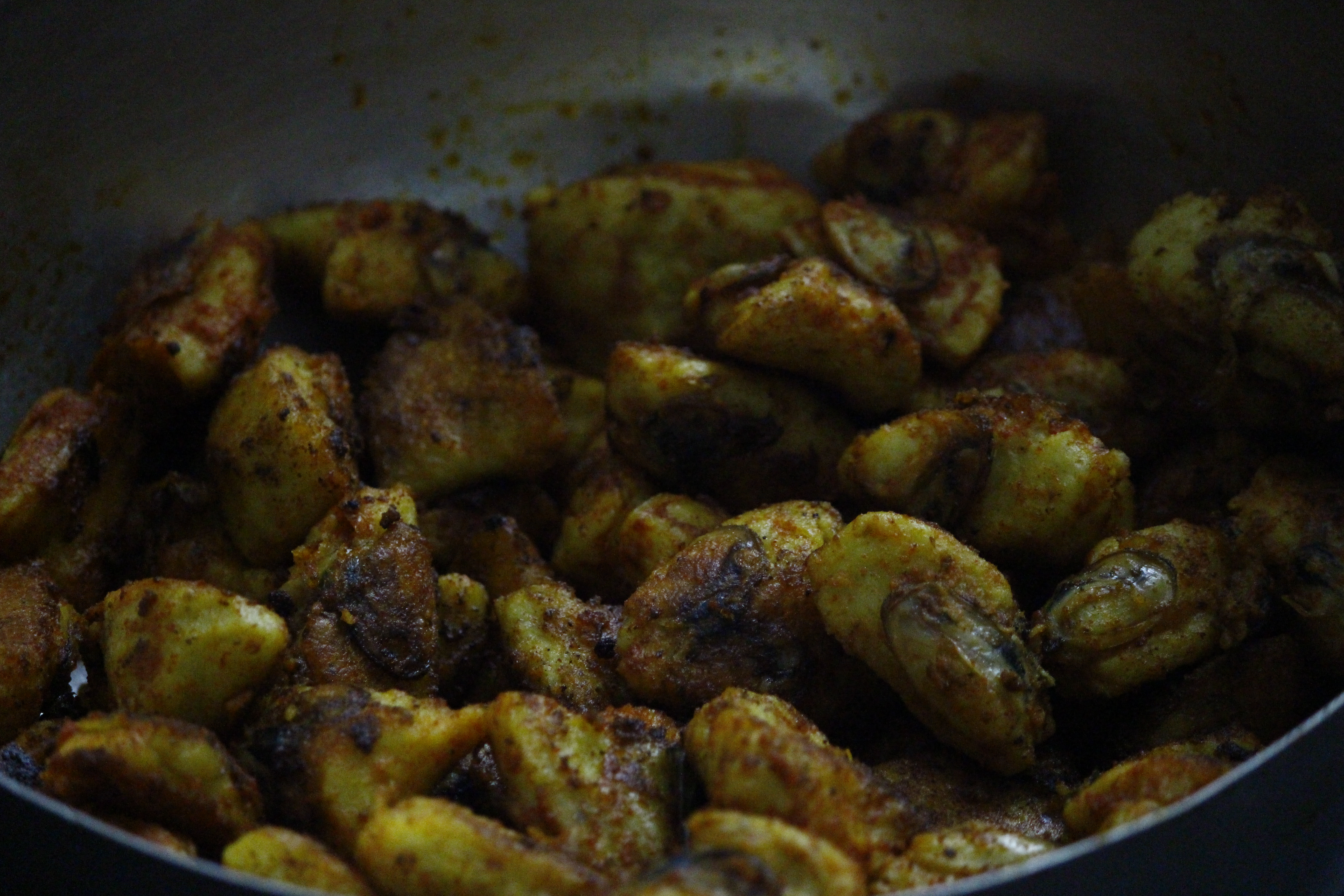 കല്ലുമ്മക്കായ നിറച്ചത്, കണ്ണൂർ